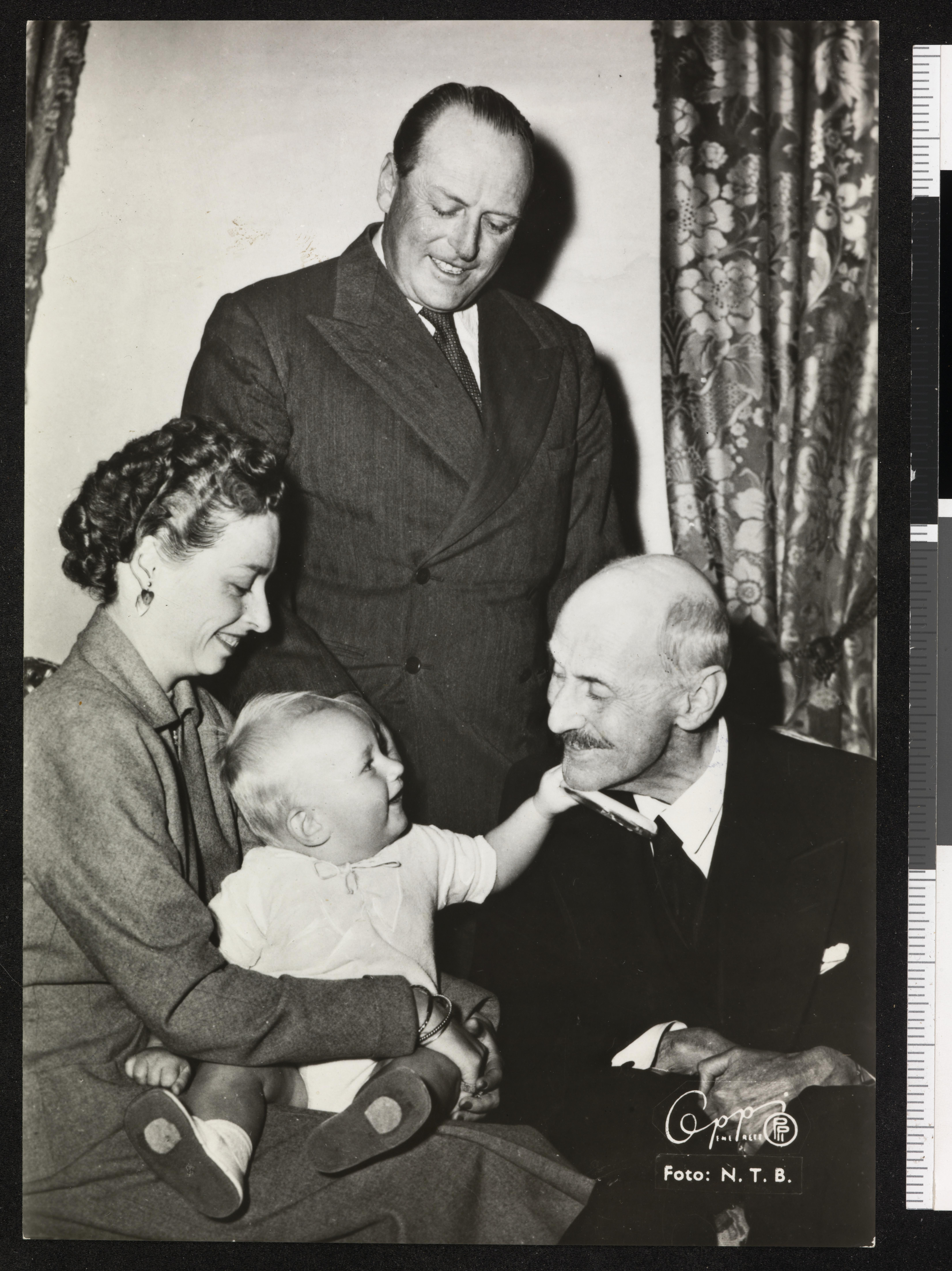 Bildet er hentet fra Nasjonalbibliotekets bildesamling. Anmerkninger til bildet var: Prinsesse Ragnilds sønn Haakon Lorentzen (f.1954) var kong Haakons første oldebarn og oppkalt etter ham. Dette er forøvrig et av de få offisielle bilder der kongen smiler. Depicted person: Olav V konge av Norge Depicted person: Ragnhild, fru Lorentzen Prinsesse av Norge Depicted person: Haakon VII konge av Norge